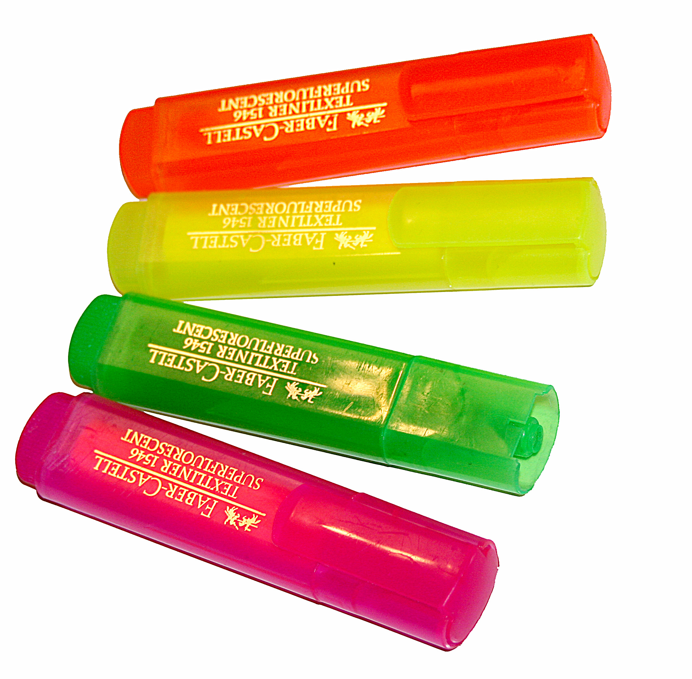 Faber-Castells' colour pens